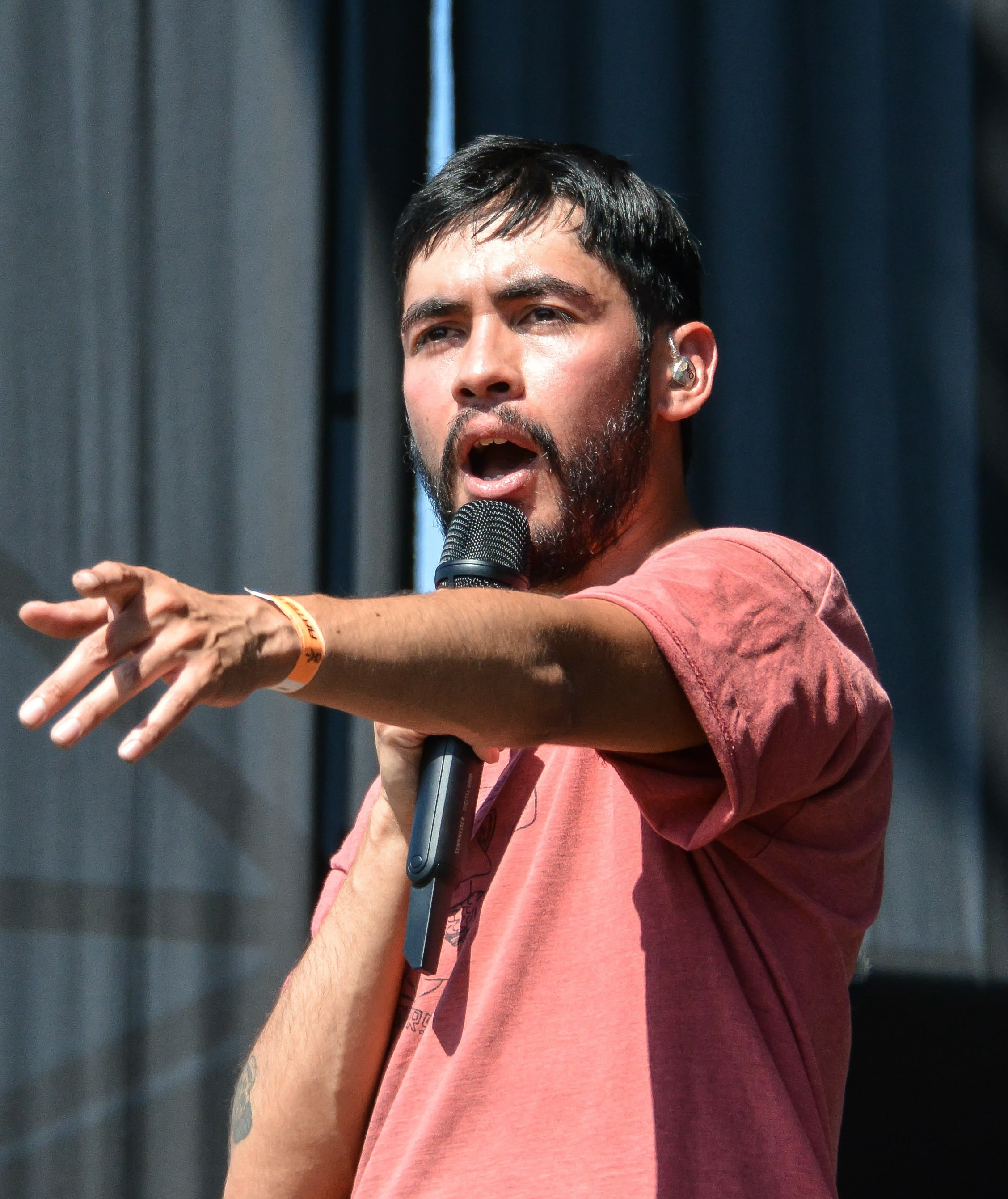 Cristóbal Briceño en la Cumbre del Rock Chileno 2018, Santiago, Chile